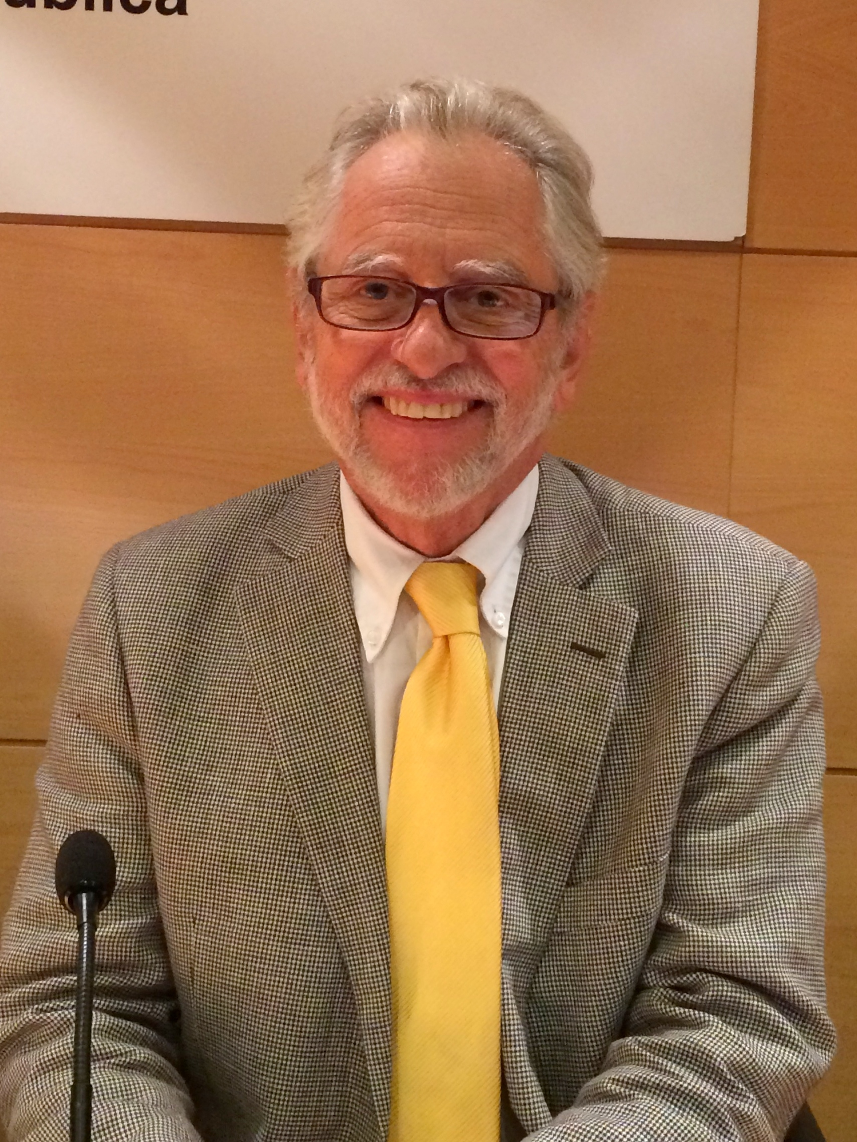 Carles Viver i Pi-Sunyer a l'Escola de Funció Pública de Catalunya, 2014